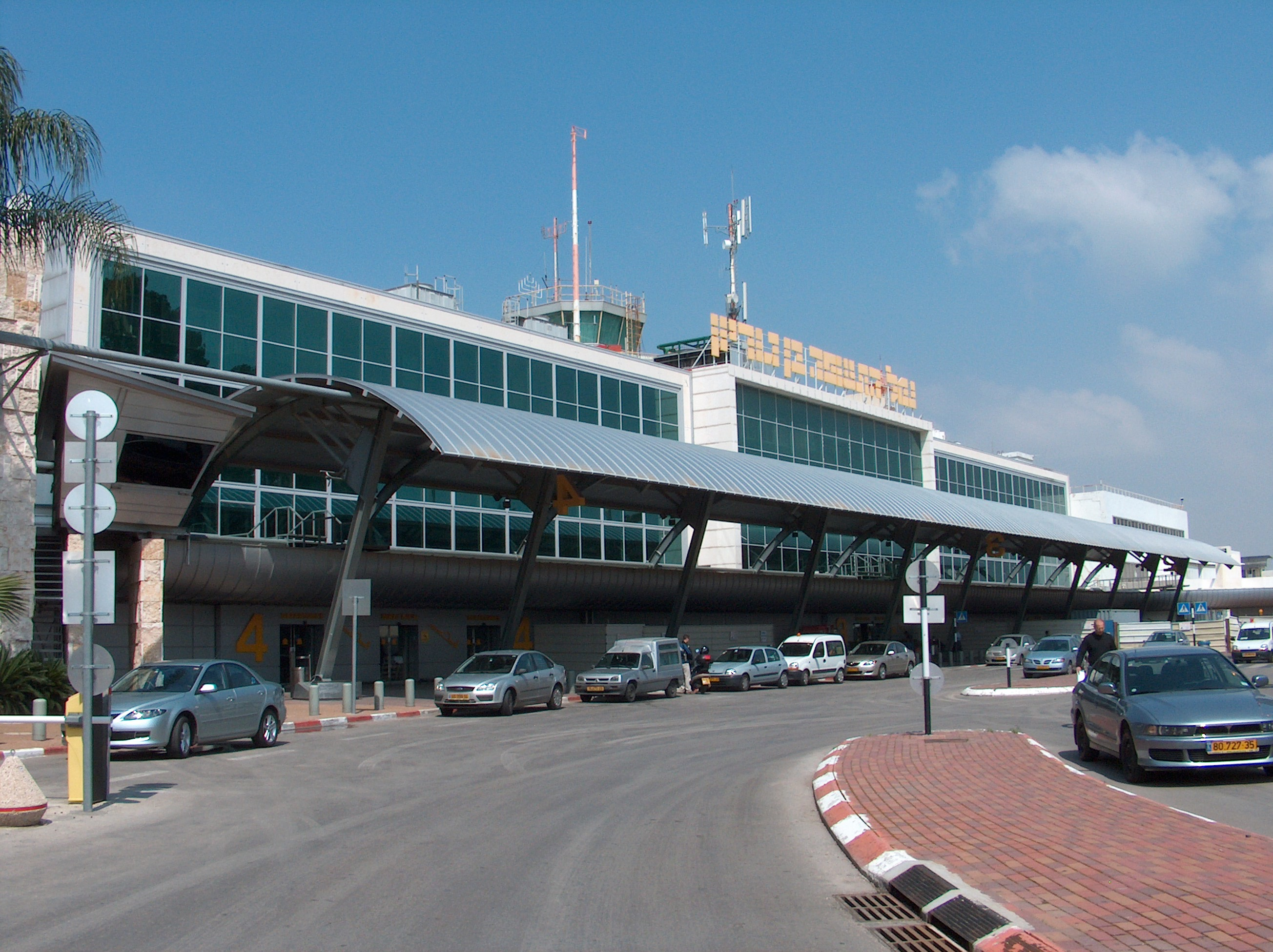 Ben Gurionovo mezinárodní letiště